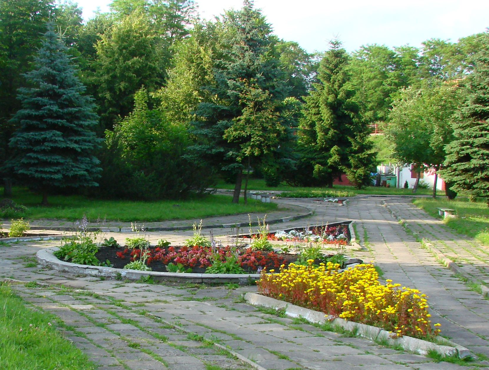 Dywany Kwiatowe na Placu Przyjaźni, Park zieleni w dolinie rzeki Sępolny (Sępolenki), na Starym Mieście. Place in Sępólno Krajeńskie, Poland.